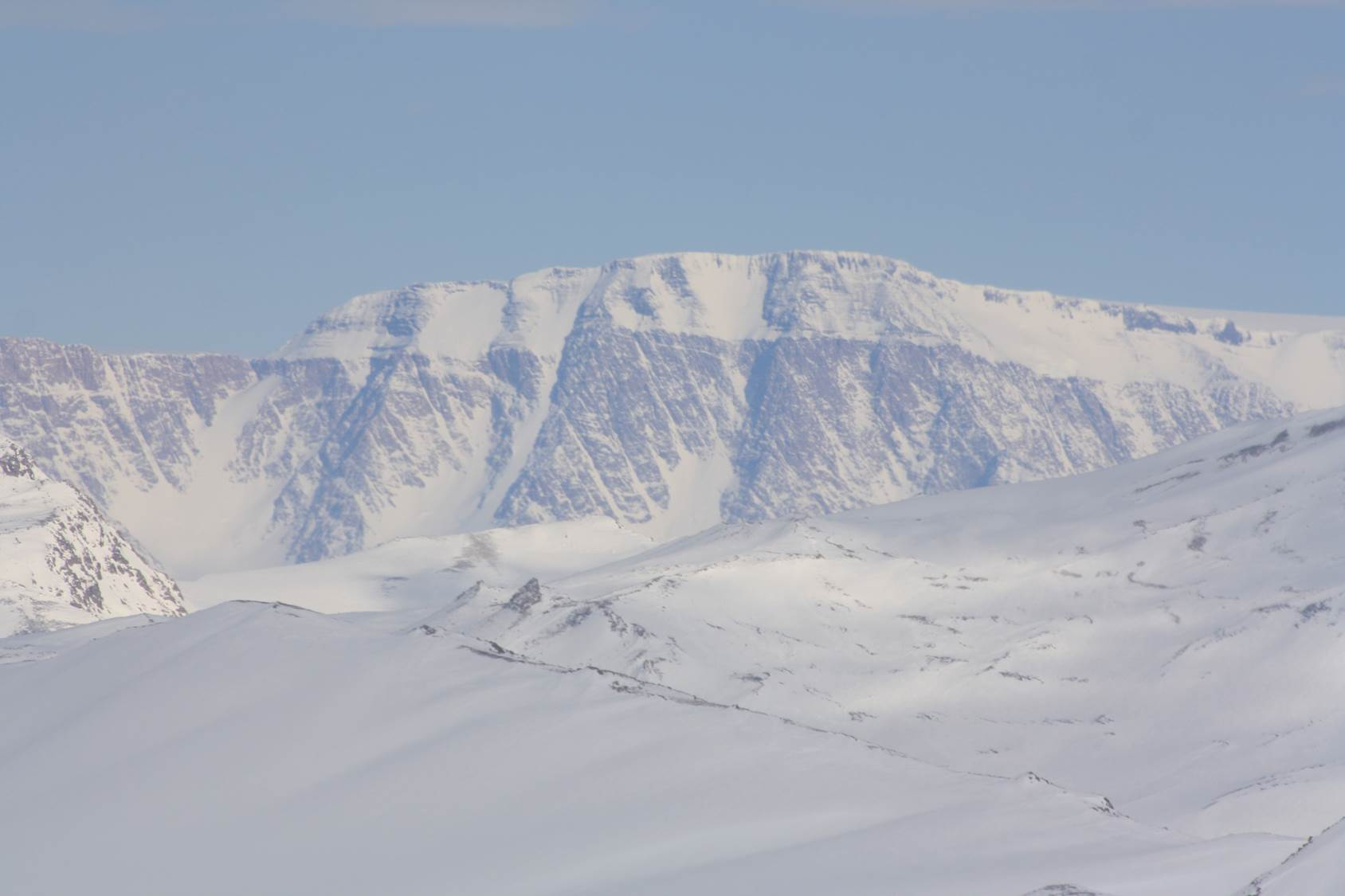 Wer glaubt, dass es in unserer globalisierten Welt keine Abenteuer für Forscher mehr gibt, der kann sich eines Besseren belehren lassen und sich an einer Expedition in die Antarktis beteiligen. Für die Expedition GANOVEX 11 sind im Dezember 2015 drei Forscher des DLR-Instituts für Planetenforschung in Berlin in Richtung Südpol aufgebrochen, um für die internationale Planetenforschung noch unbekannte antarktische Gebiete zu erkunden und gemäß ihrer geologisch-geomorphologischen Besonderheiten mit Strukturen auf dem Mars zu vergleichen. Zur Blogreihe #ExpeditionAntarktis